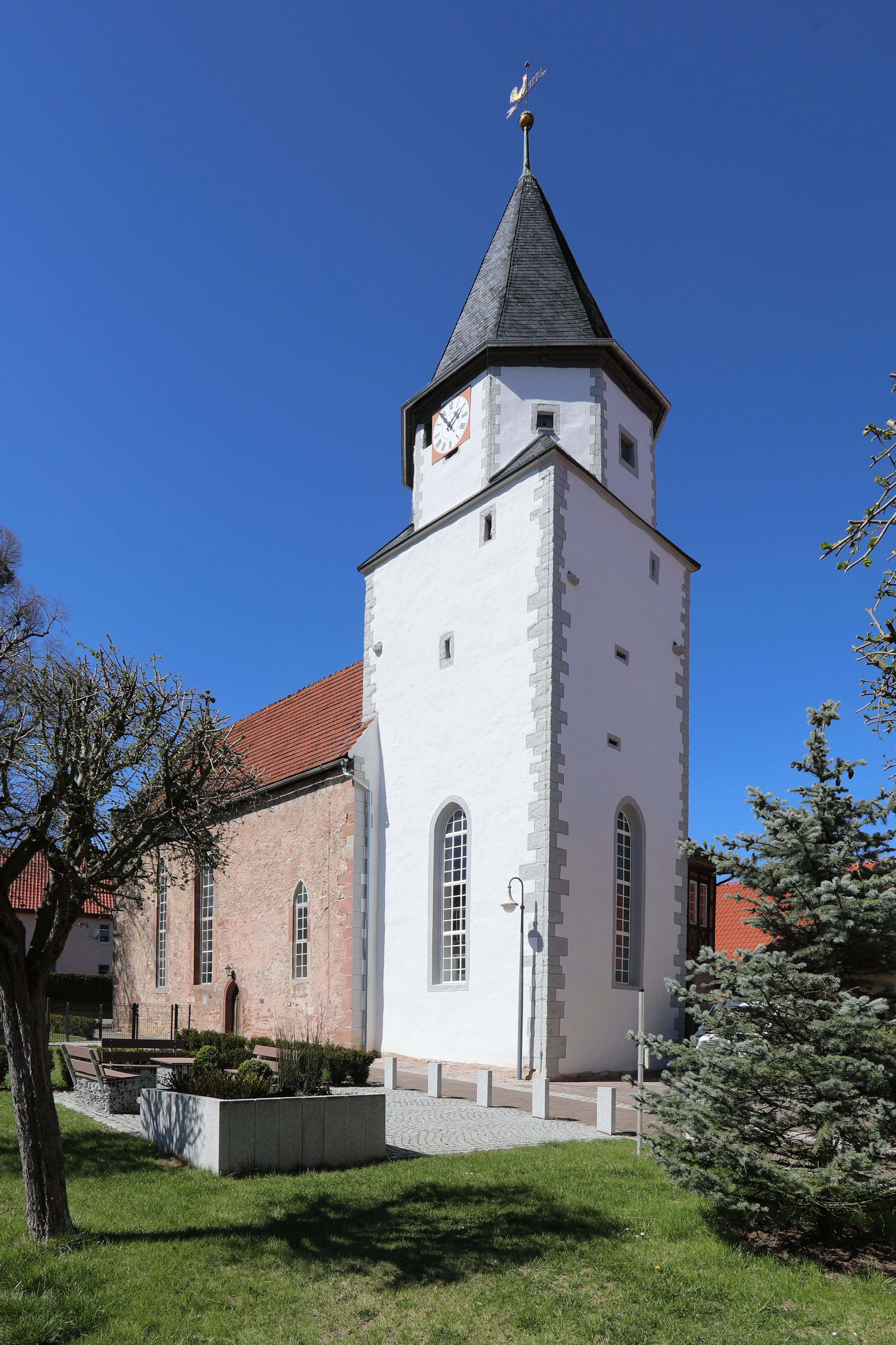 evangelisch-lutherische Kirche in Hümpfershausen